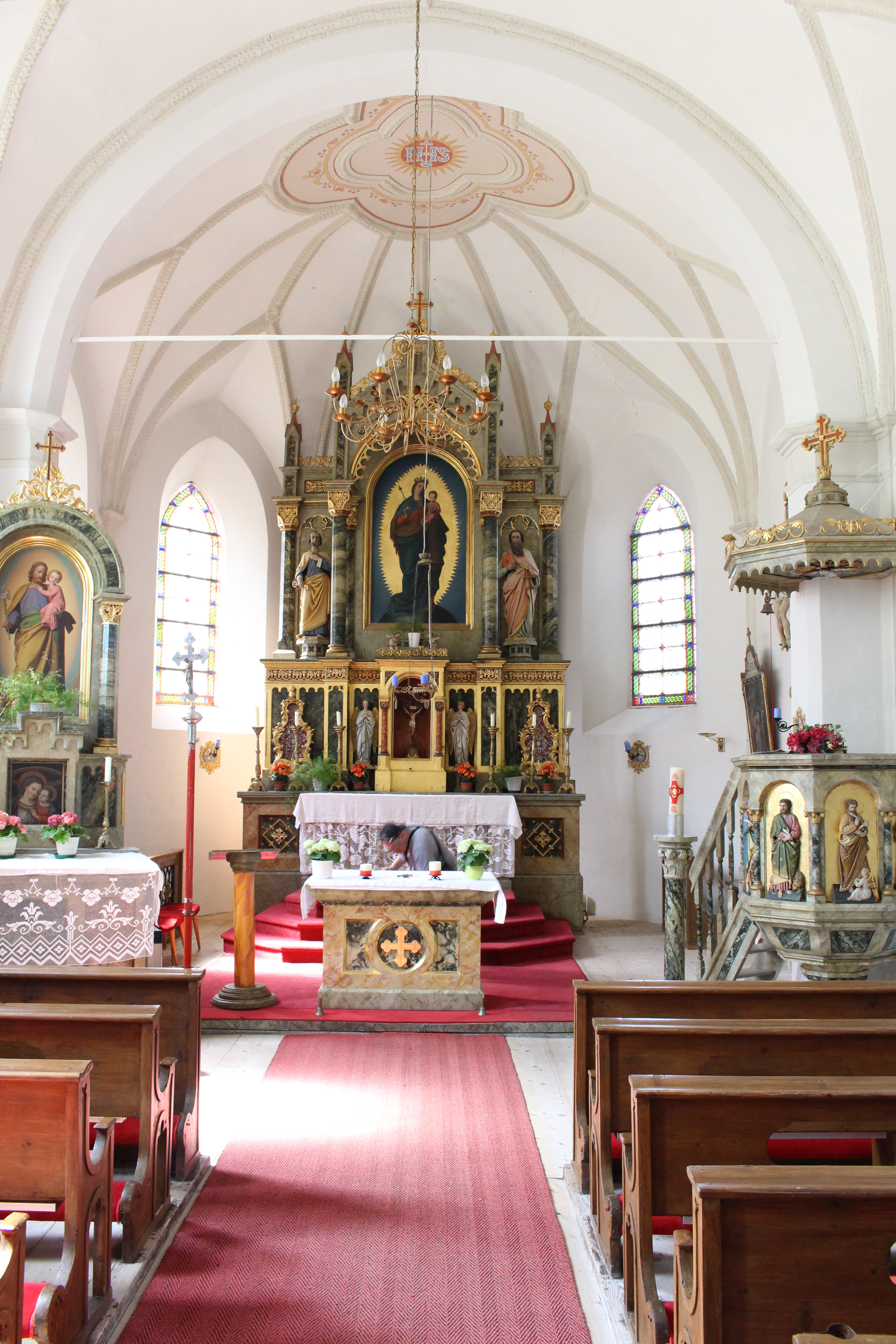 Kath. Filialkirche Mariae Reinigung